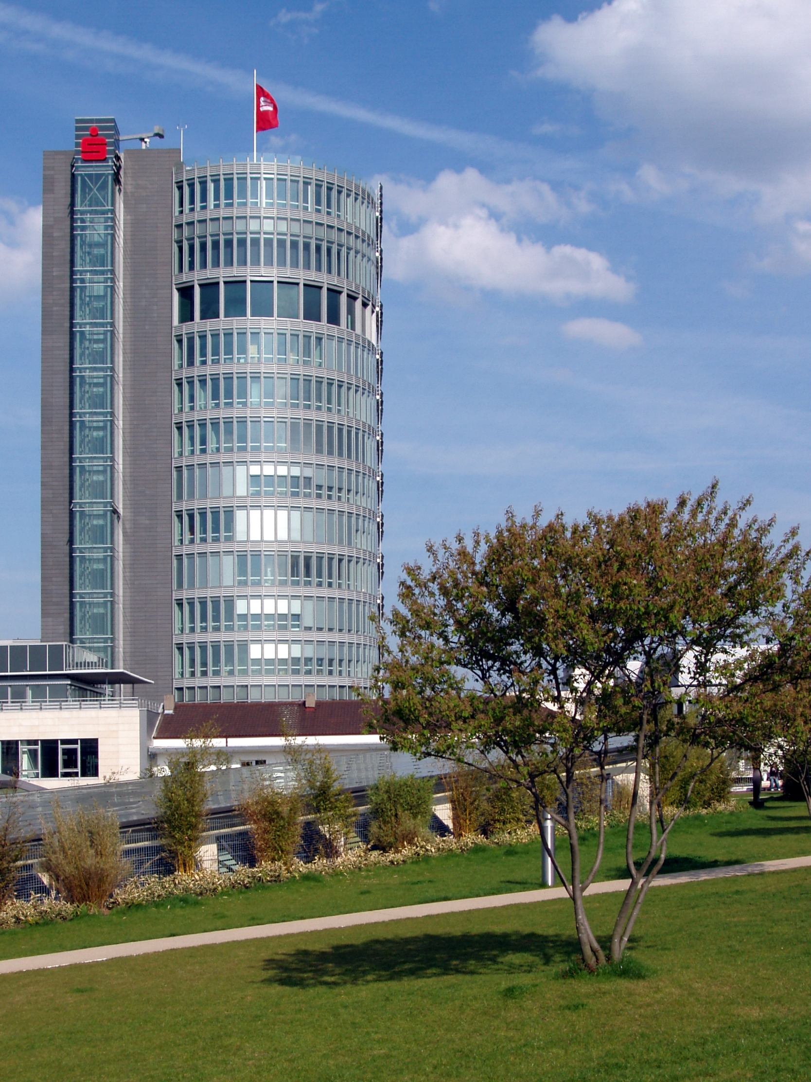 Der Turm der Sparkasse Pforzheim Calw im Zentrum der Pforzheimer Innenstadt mit Blick vom Dachgarten der Schlößle Galerie.